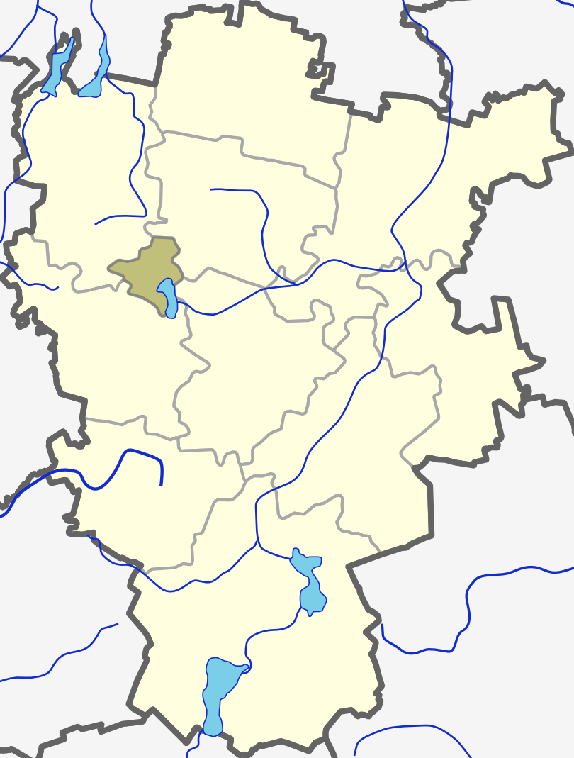 Telšių rajono žemėlapis.